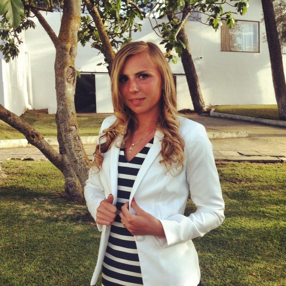 Российская легкоатлетка Екатерина Реньжина.